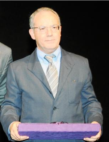 Premio Ciudad de Salamanca de Poesía